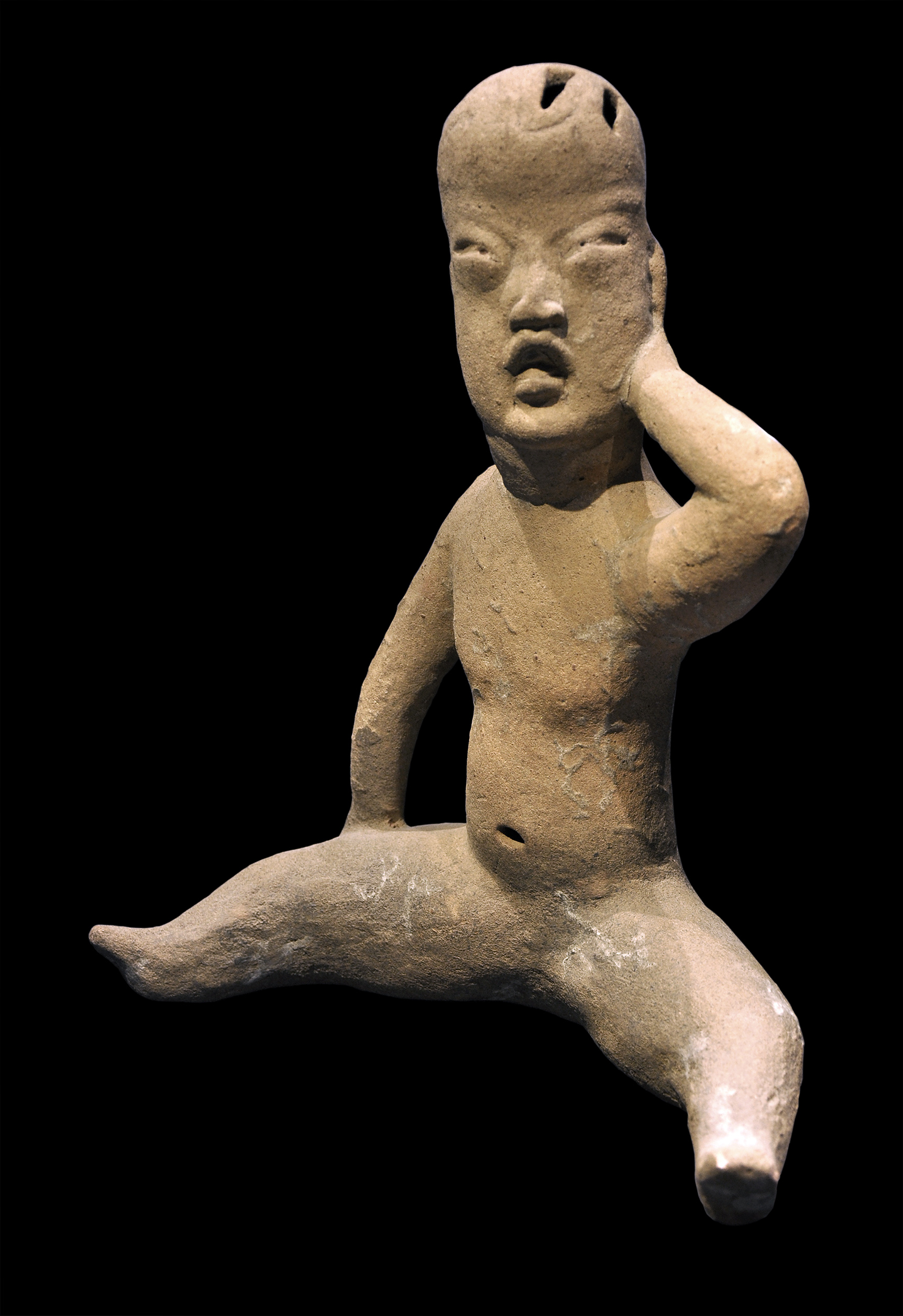 Figurine type "baby-face", culture olmèque, préclassique moyen ( 900 - 400 -JC ). Musées Royaux d'Art et d'Histoire (MRAH), Parc du Cinquantenaire, Bruxelles.